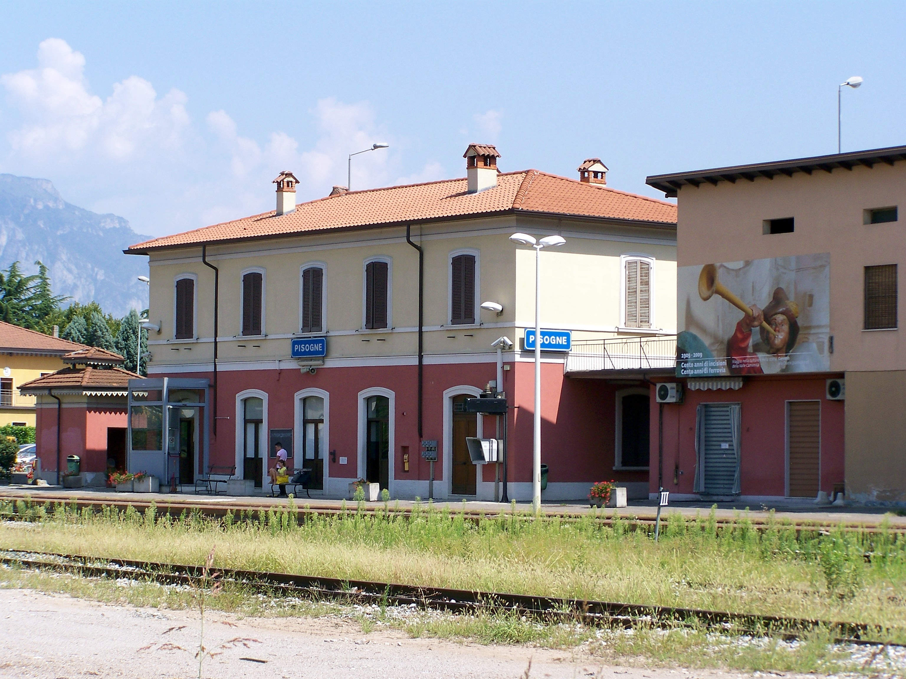 Lato ferrovia della stazione di Pisogne sulla Brescia-Iseo-Edolo.